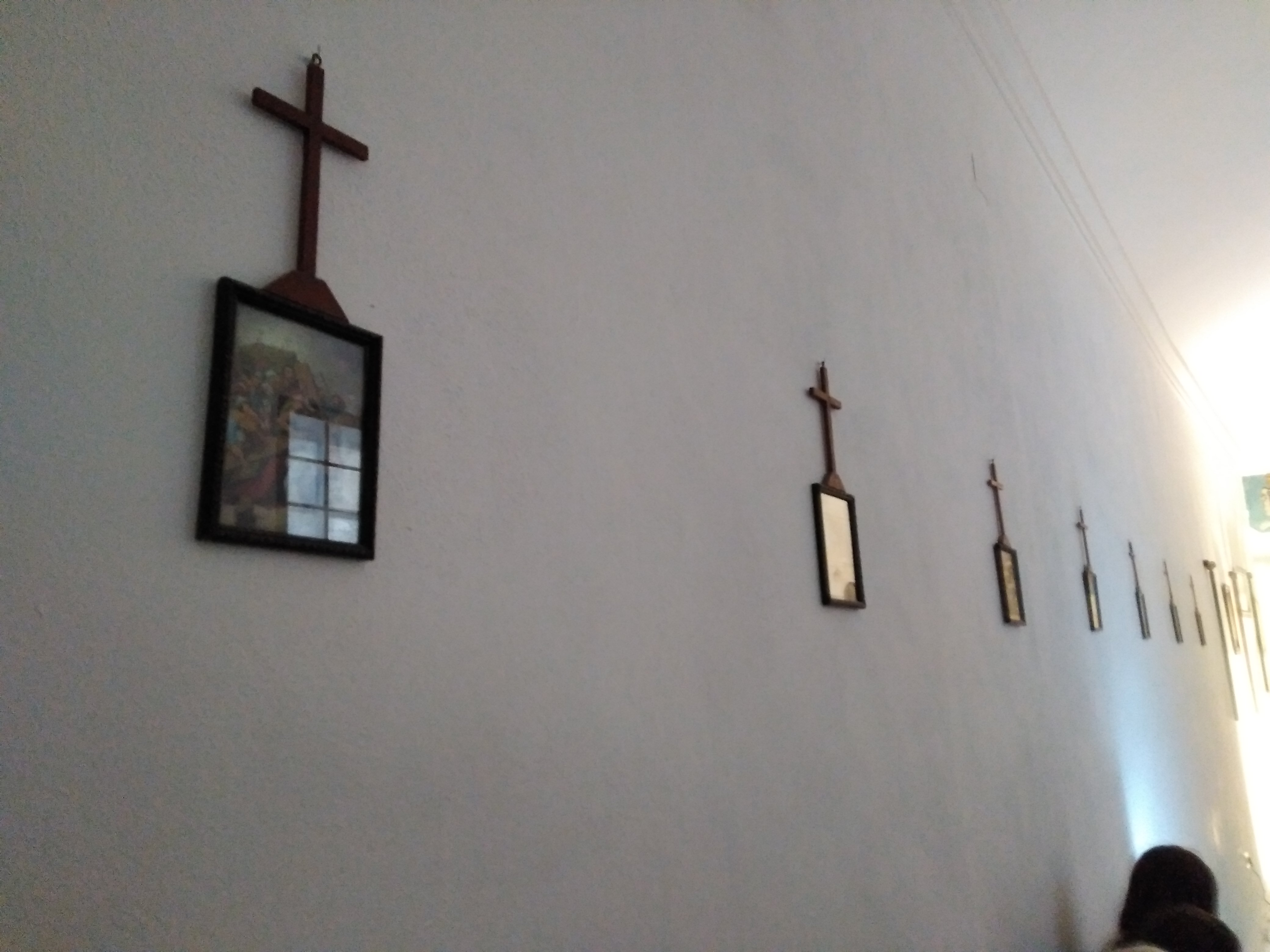 originalmente en la Iglesia del Mimbral